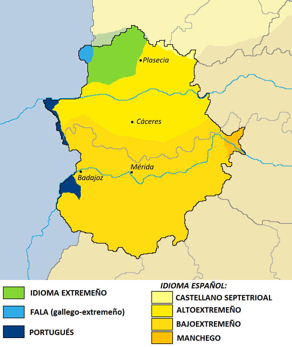 Idiomas y variedades lingüísticas de Extemadura, España.